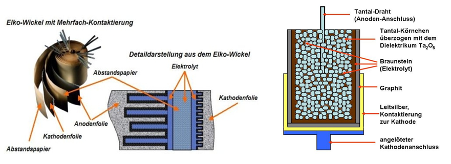 Prinzipielle darstellung von Al- und Ta-Elko